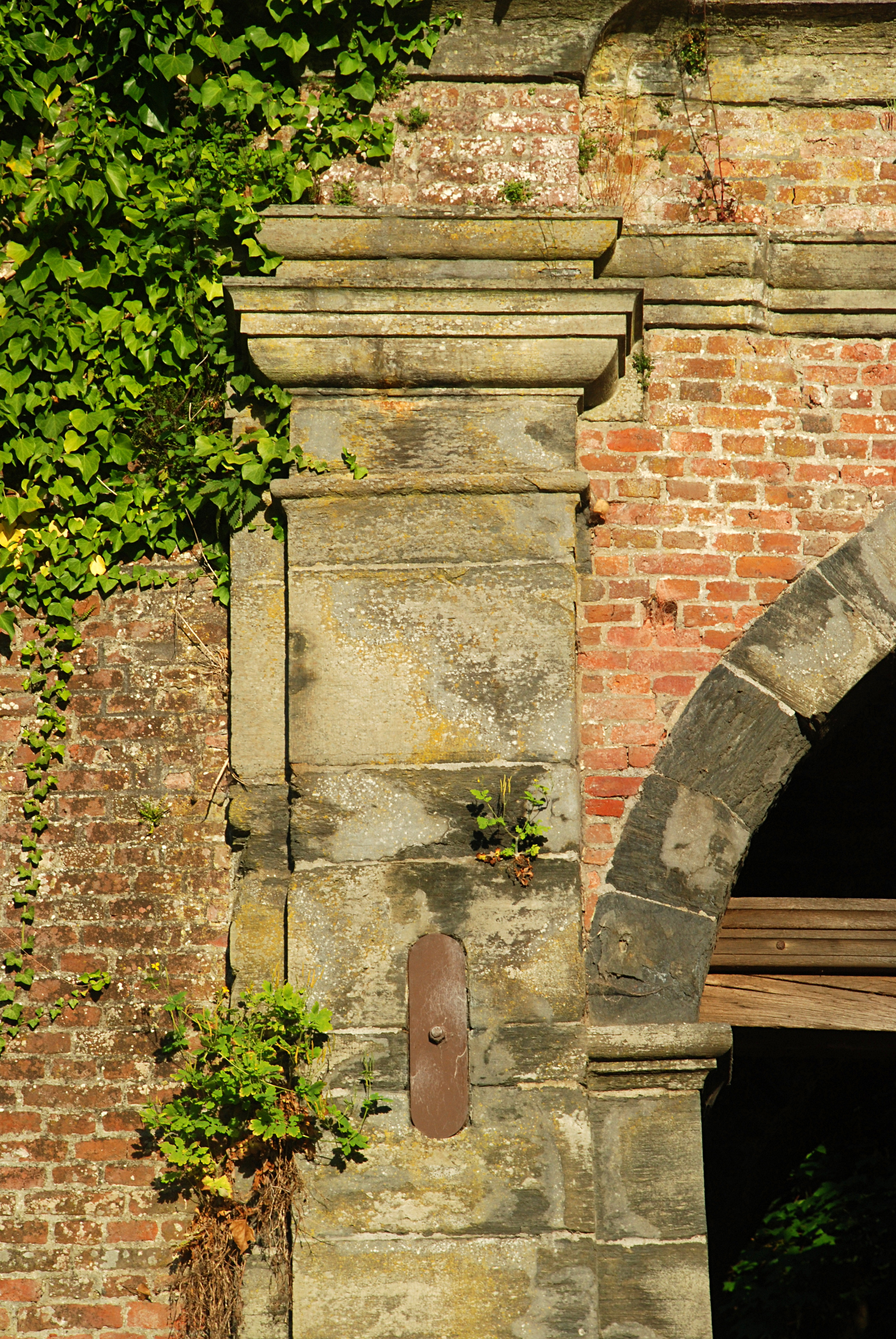 Belgique - Brabant wallon - Villers-la-Ville - Porte de Namur